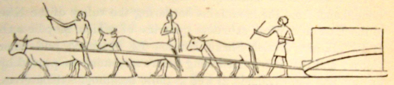 Transport d'un bloc de pierre à l'aide boeufs, carrière de el-masara